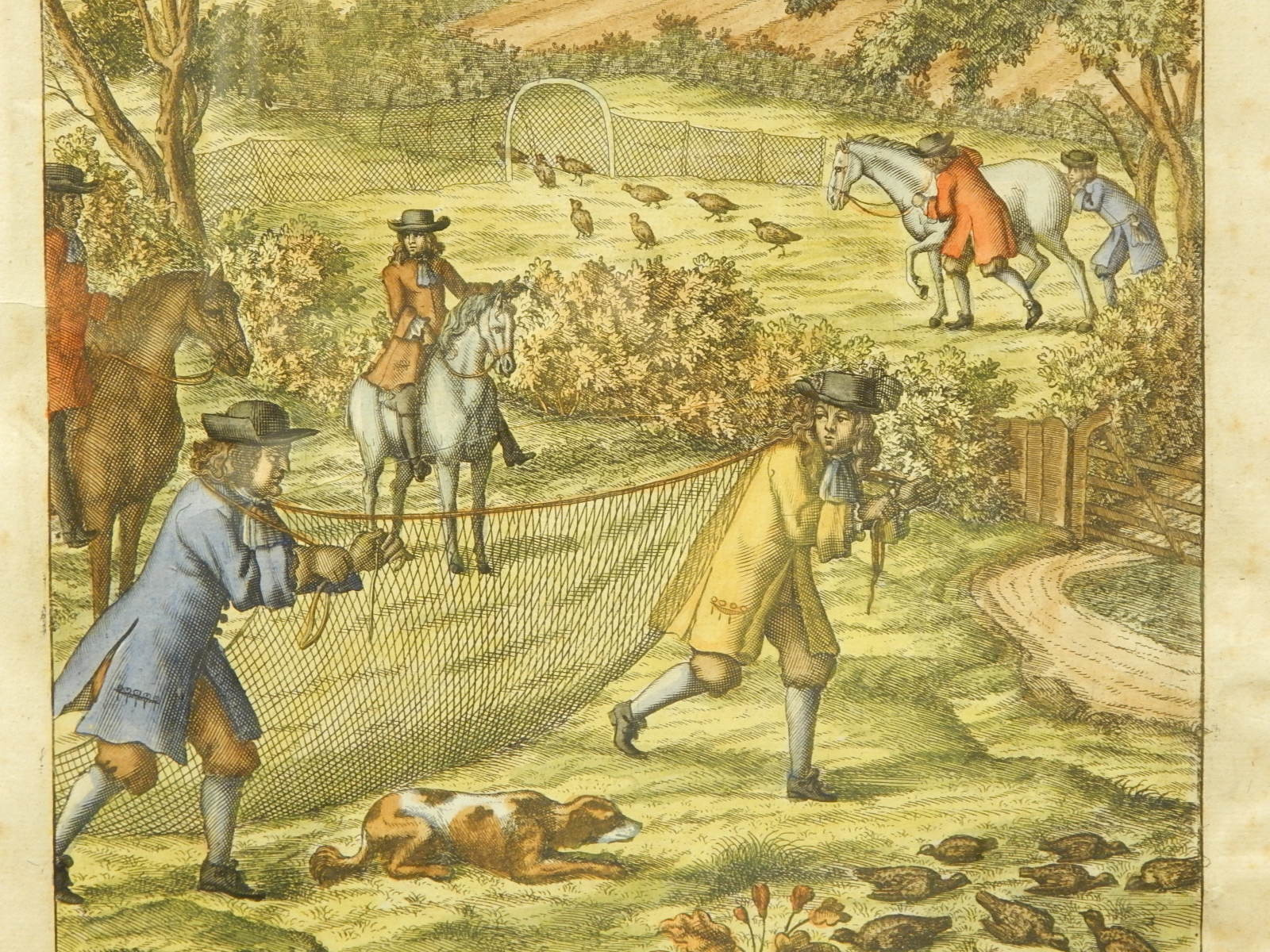 Copper engraving entitled "The Setting Dogg & Partridgs" (detail)